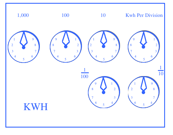 نظام التسجيل ذو المؤشر لمقياس التيار الحثي